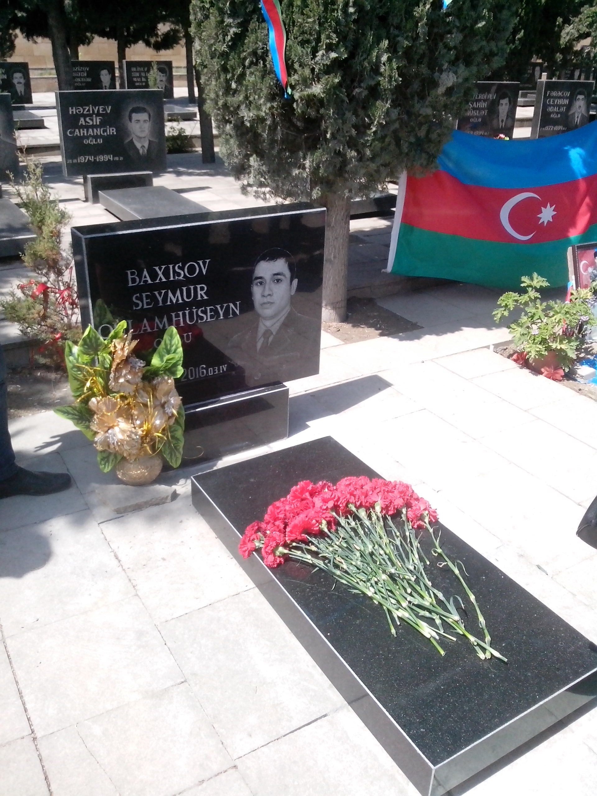 Sumqayıt Şəhidlər Xiyabanında dəfn olunan şəhid